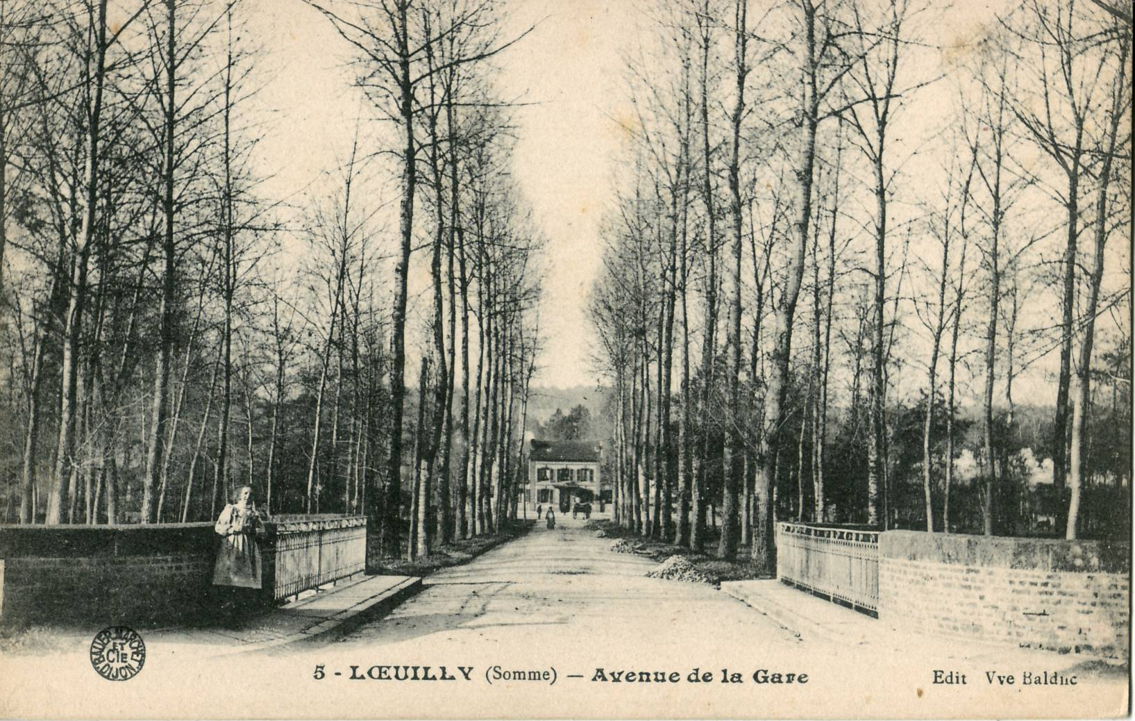 Carte postale ancienne éditée par Bauer & Marchet à Dijon pour Veuve Baldnc : LŒUILLY - Avenue de la Gare